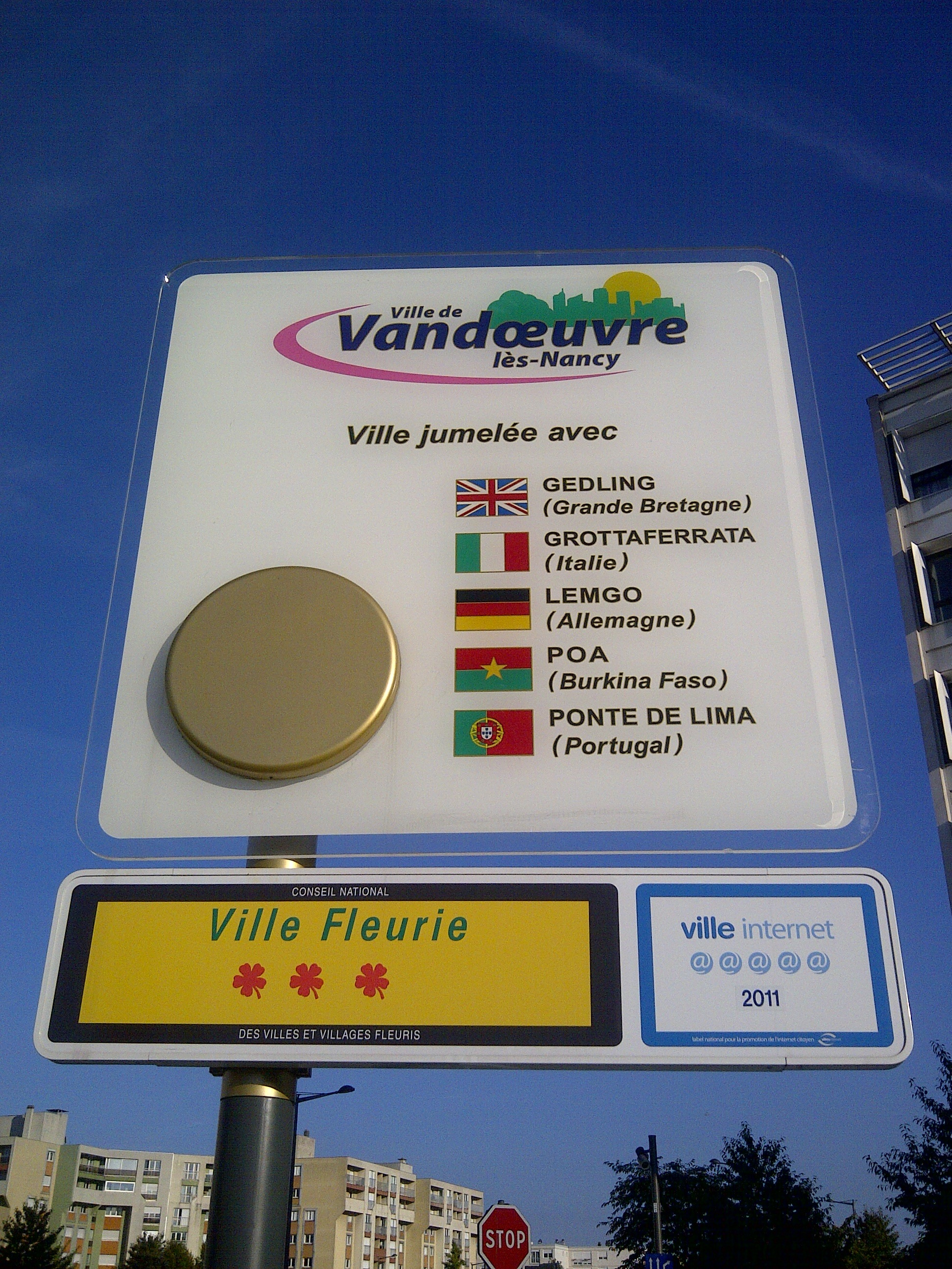 Vandoeuvre ville internet